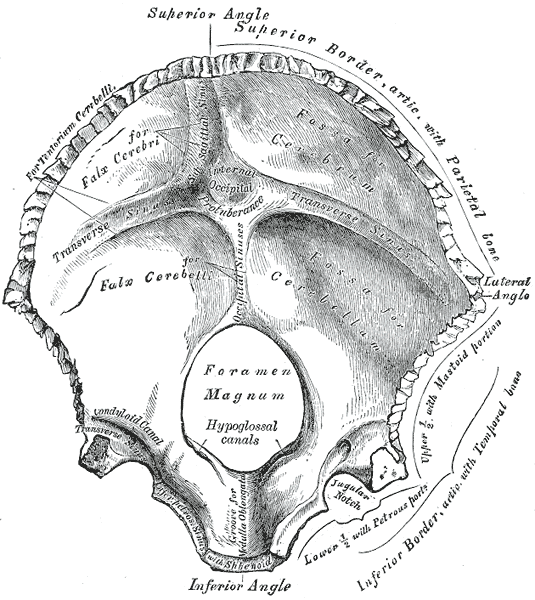 Occipita bone. Inner surface.